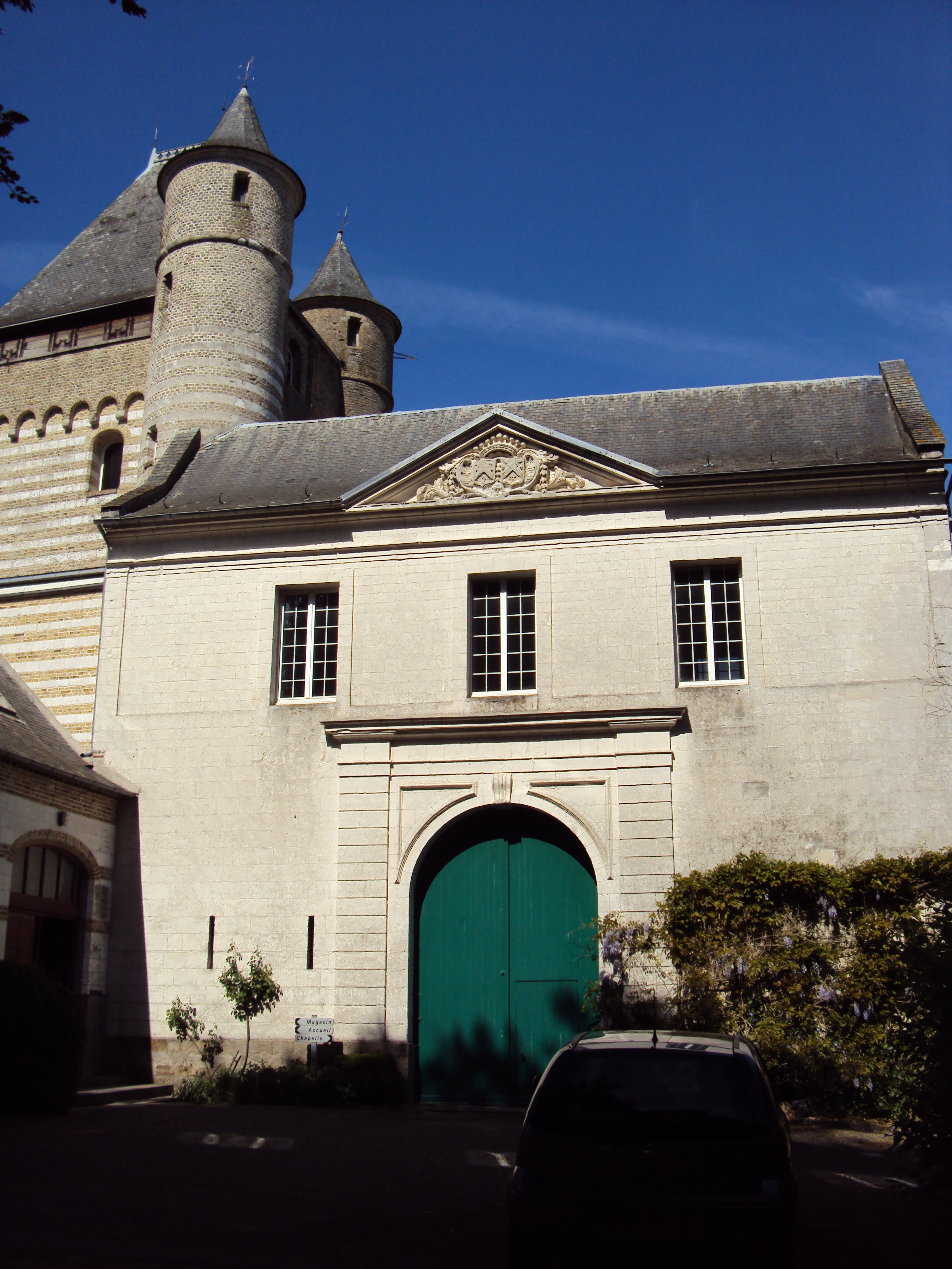 Abbaye Saint-Paul de Wisques (entrée)